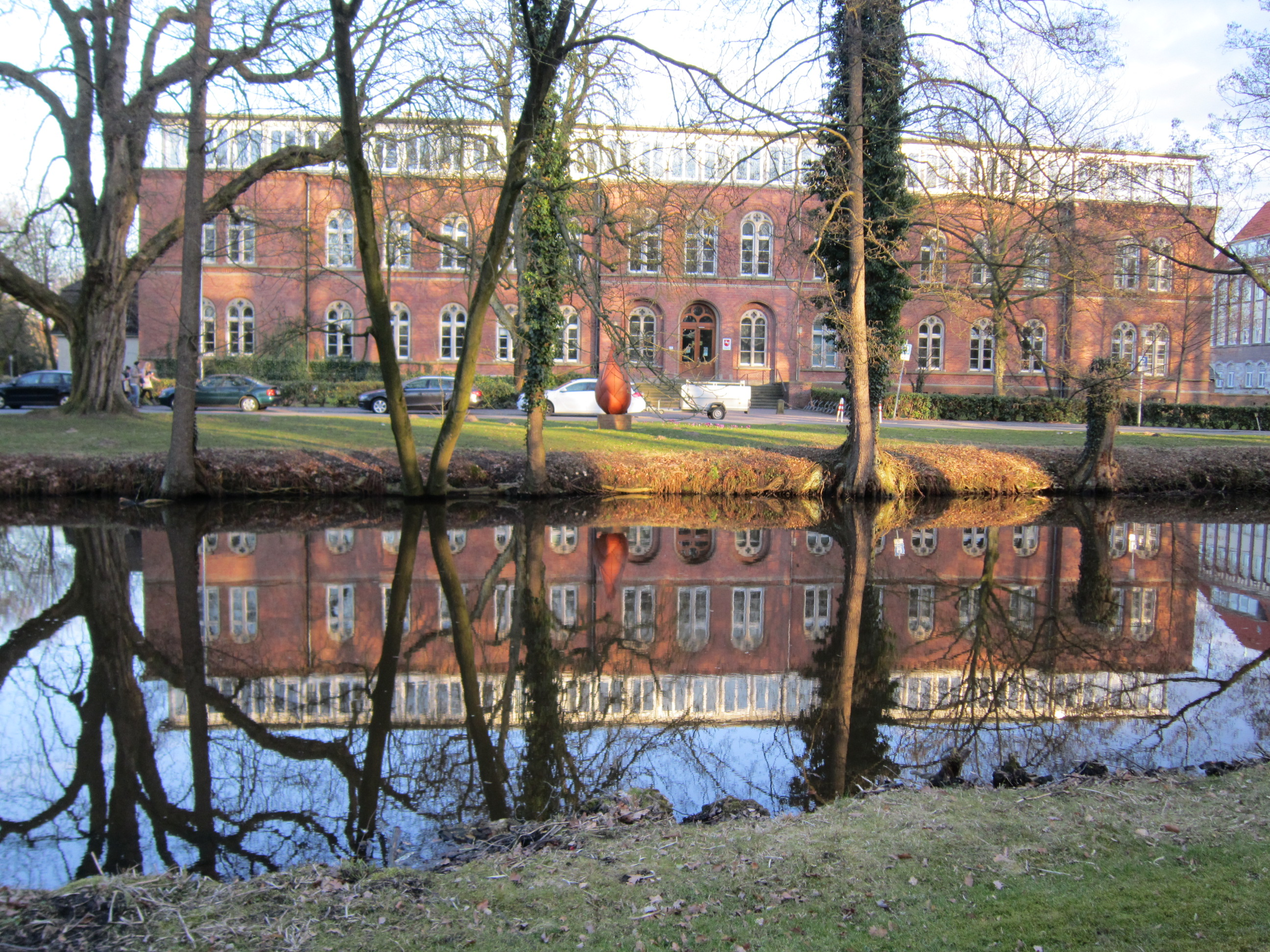 Gebäude des Landgerichts Oldenburg